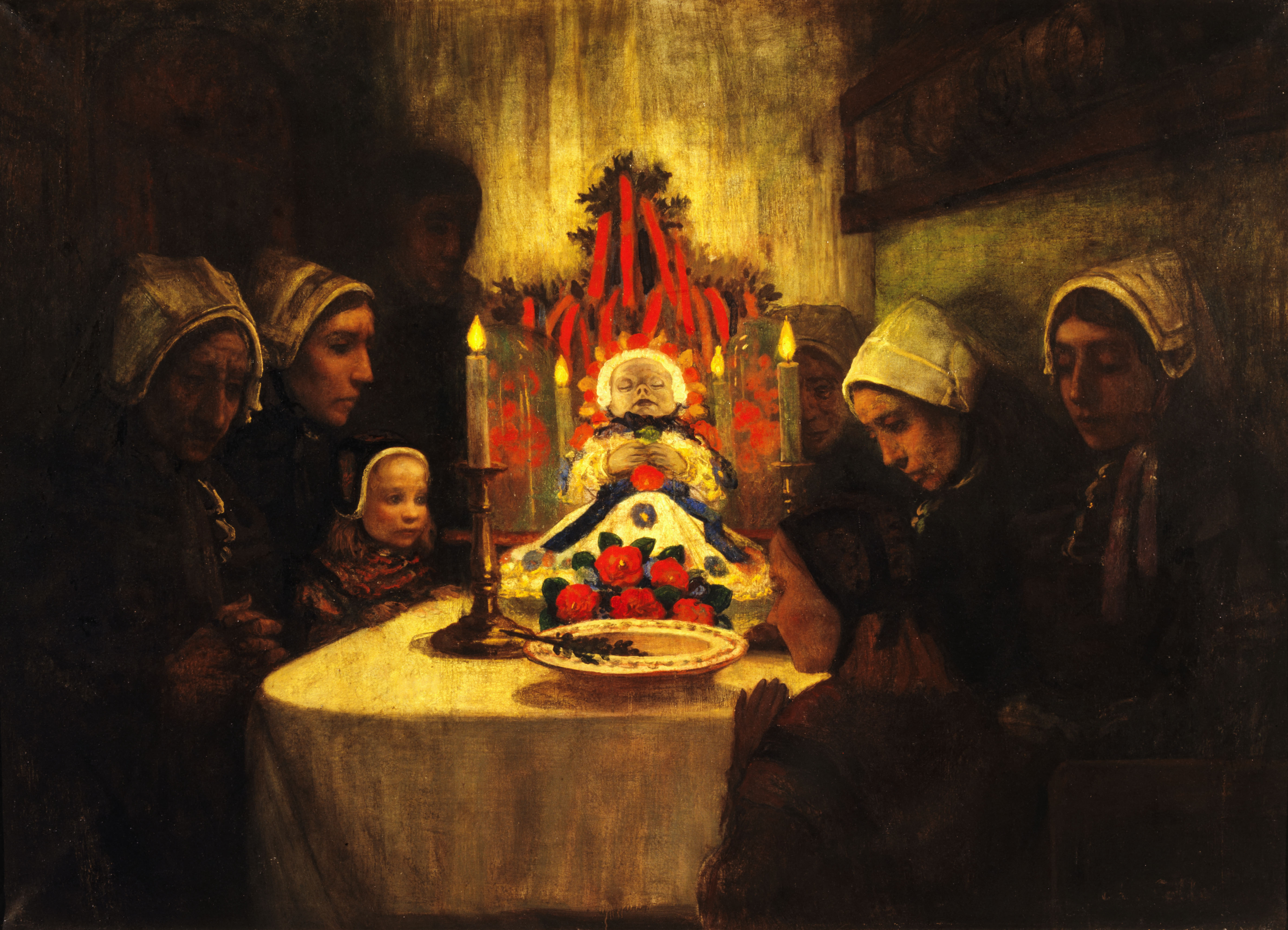 Charles Cottet : Gens d'Ouessant pleurant un enfant mort (huile sur toile, 91 x 125 cm, Musée des beaux-arts de Quimper, dépôt du musée du Petit Palais à Paris)